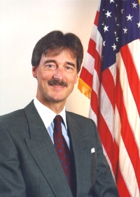 Michael Klosson, Ambassador to Cyprus